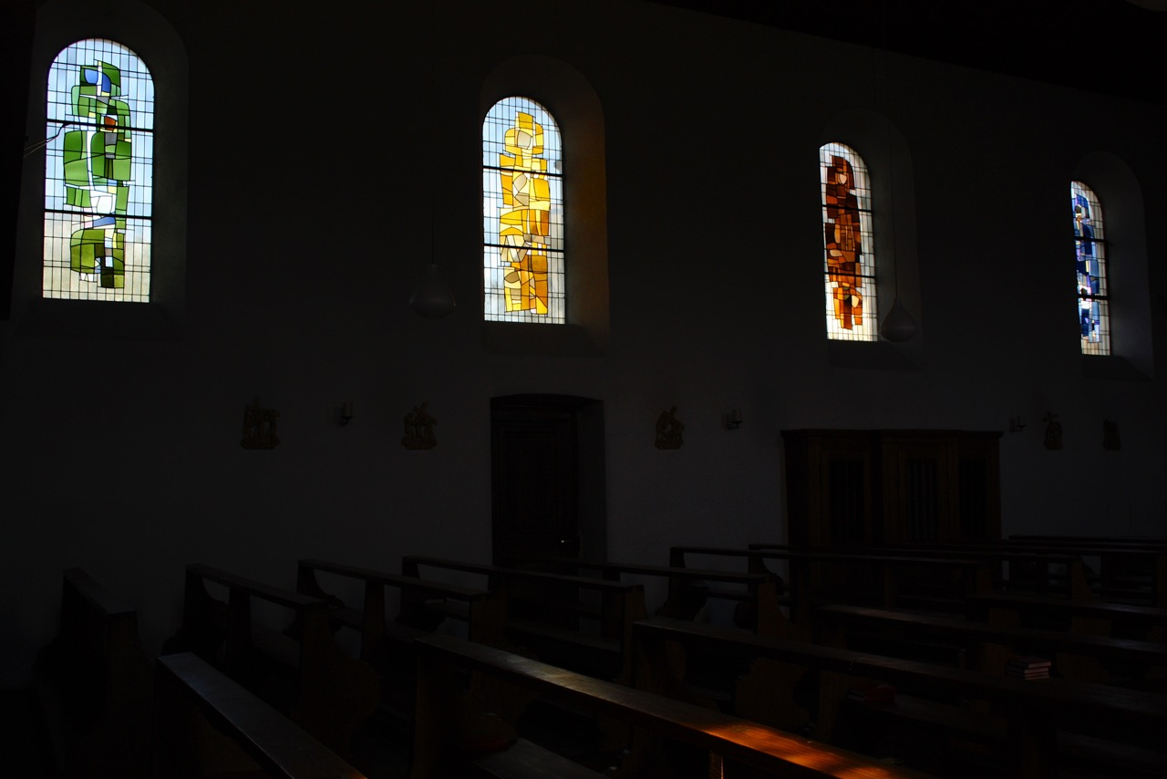 Bernard Schorderet, Vitraux de l'église de Bonnefontaine (Suisse)